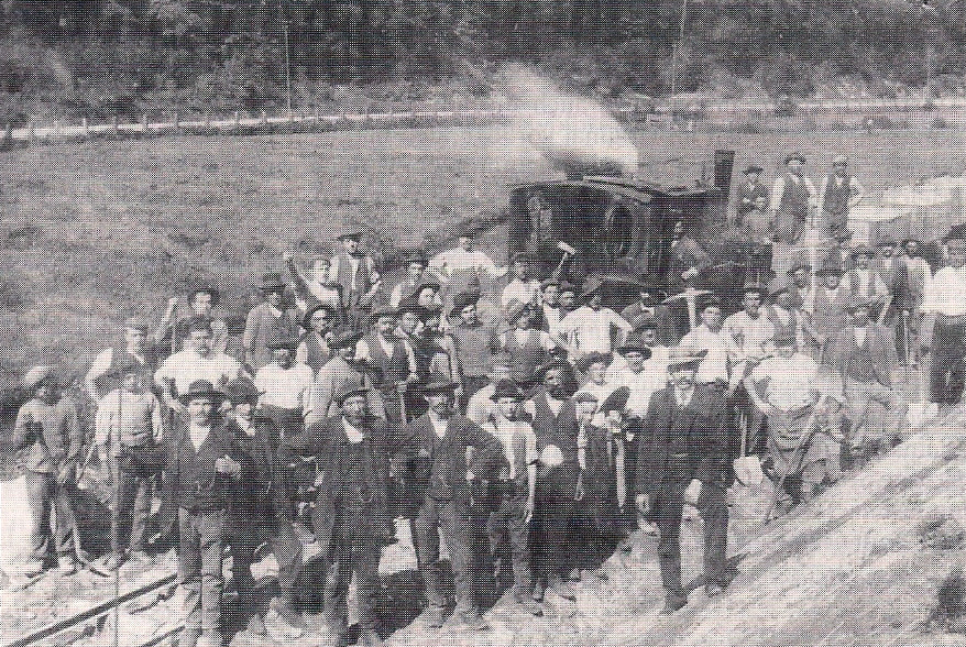 Arbeiter beim Bau des Kuckcuksbähnels Anfang des 20. Jahrhunderts